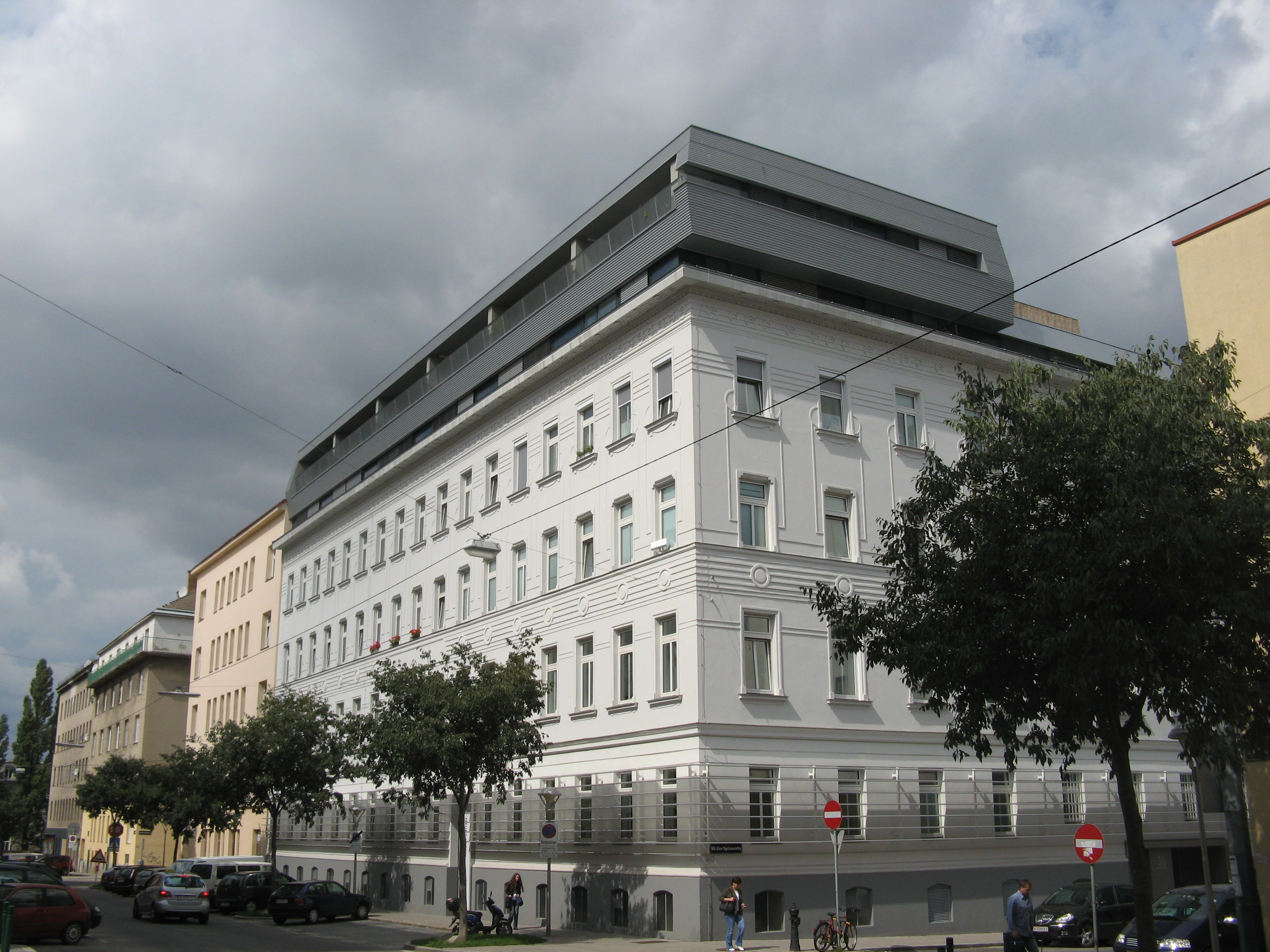 Jugendstilhaus, Troststraße 108-110, Wien-Favoriten